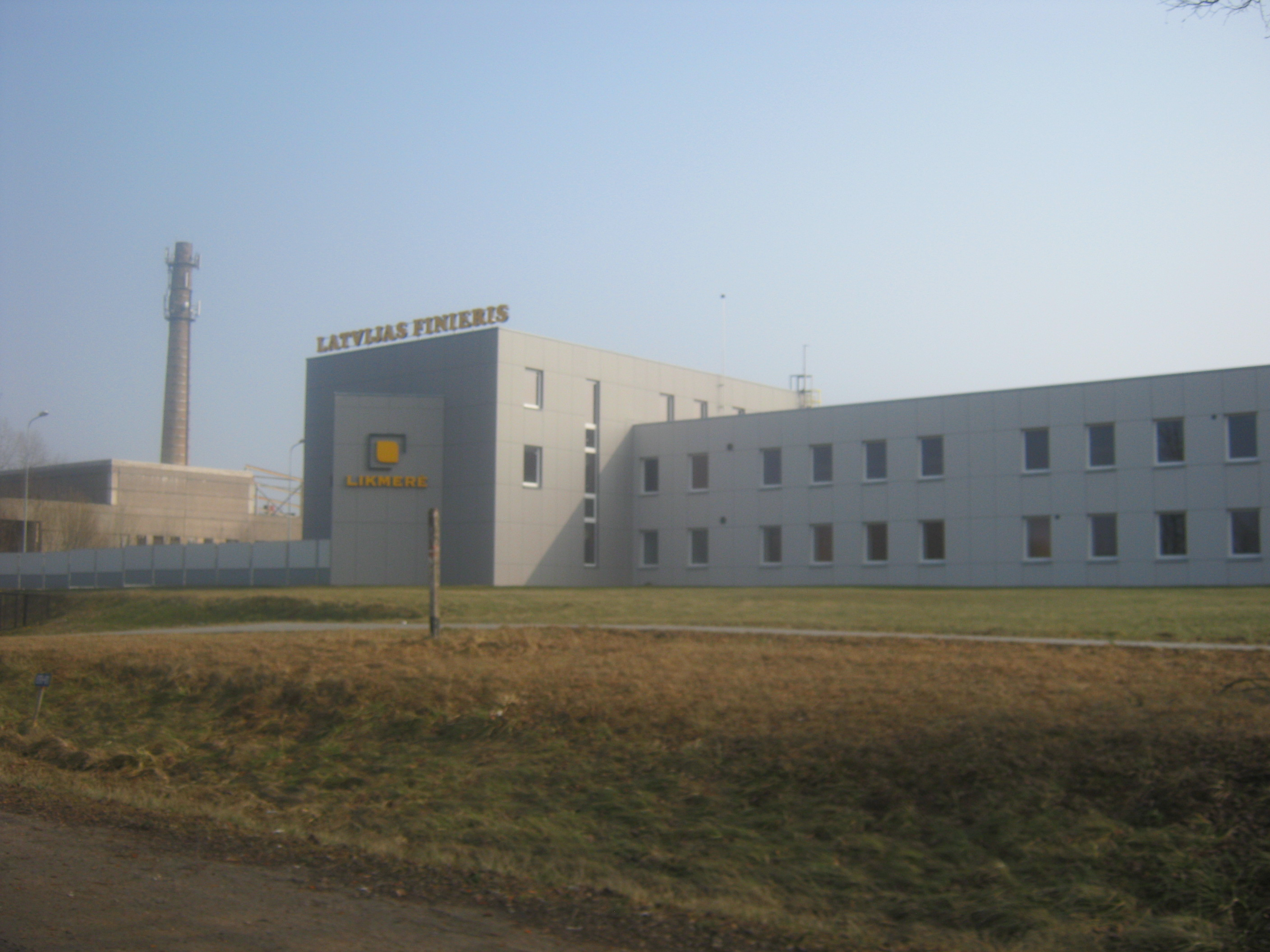 Ukmergė